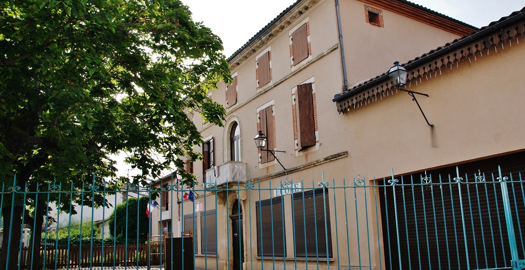 Mairie et école